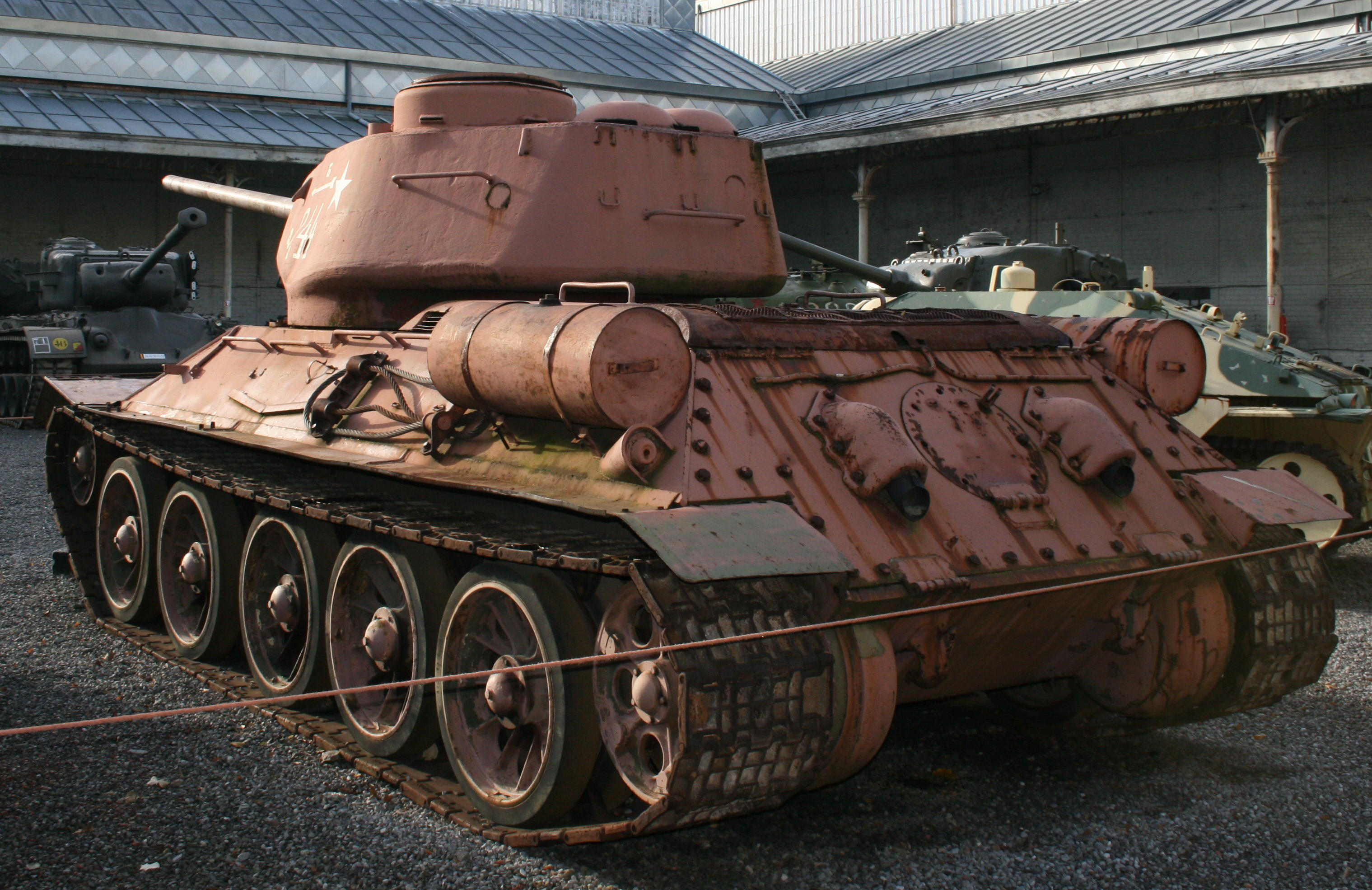 T-34 - Brussels